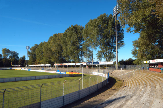 Holstein-Stadion alte Gegengerade/Nordtribüne